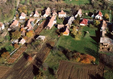 Pusztaszemes, Hungary, aerialphotography